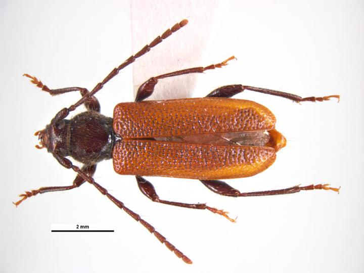 Callidiellum rufipennis